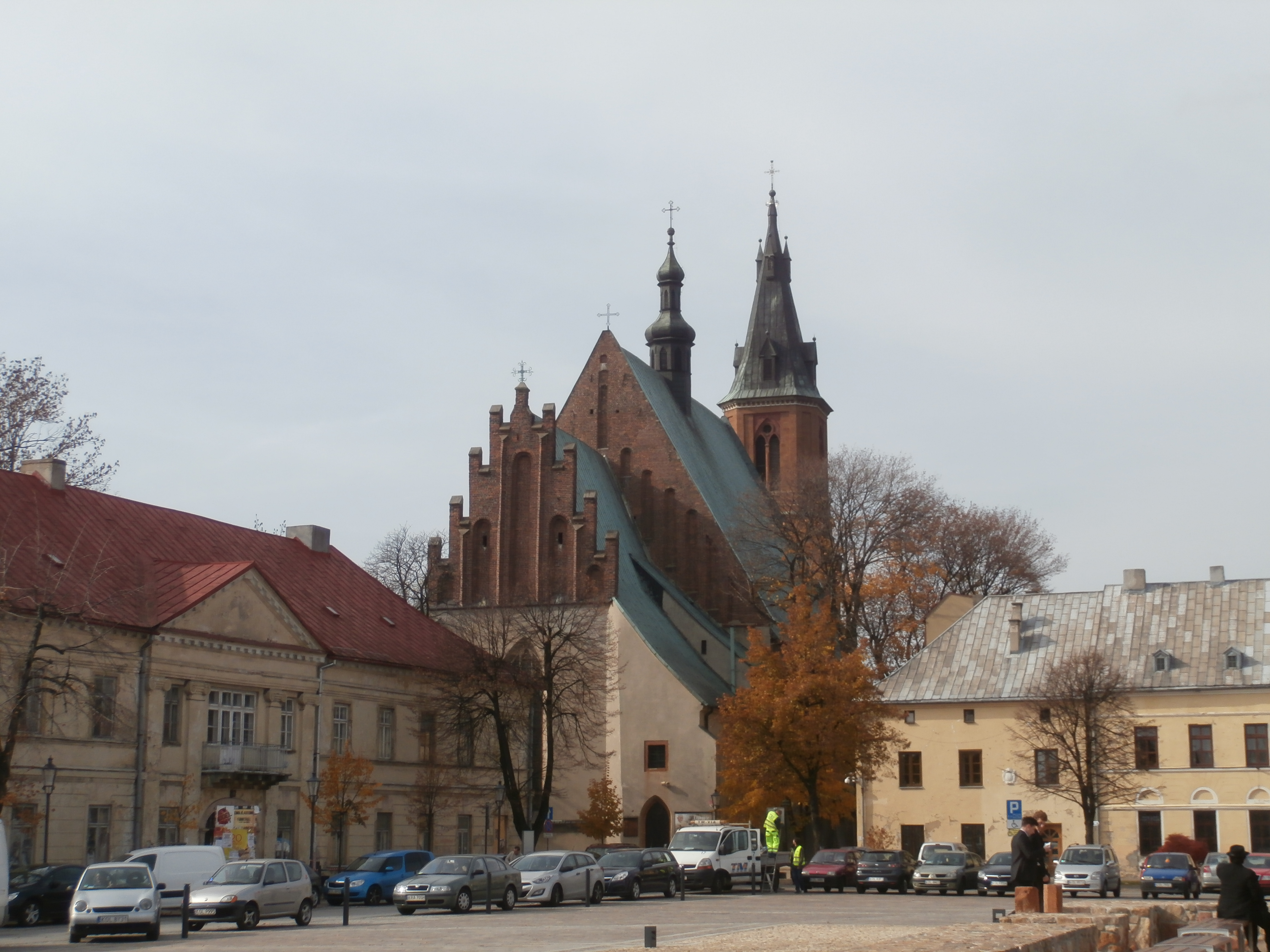 Bazylika św. Andrzeja Apostoła w Olkuszu widziana z Rynku, z lewej budynek pod adresem Rynek 4